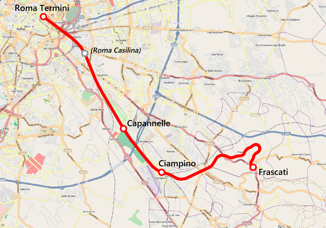 Mappa della ferrovia Roma-Frascati